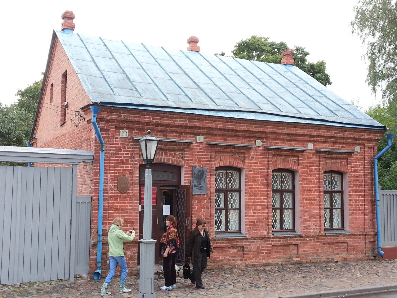 Беларуская (тарашкевіца): Дом-музэй М. Шагала. г. Віцебск This is a photo of Belarusian heritage monument. Reference number: 213Д000060 ( WLM)